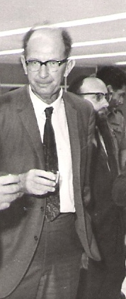 מרדכי קיקיון